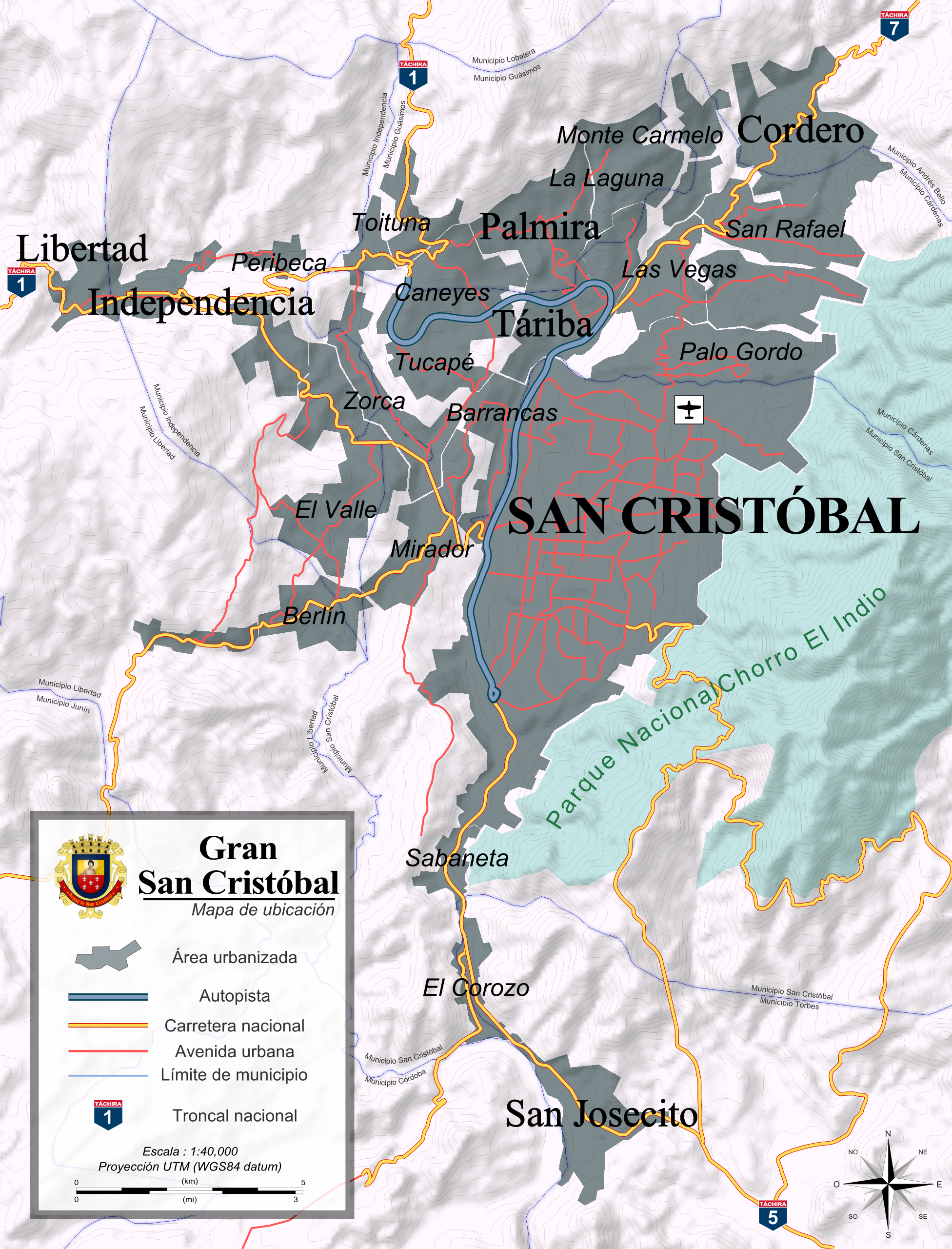 Conurbación del área metropolitana de San Cristóbal